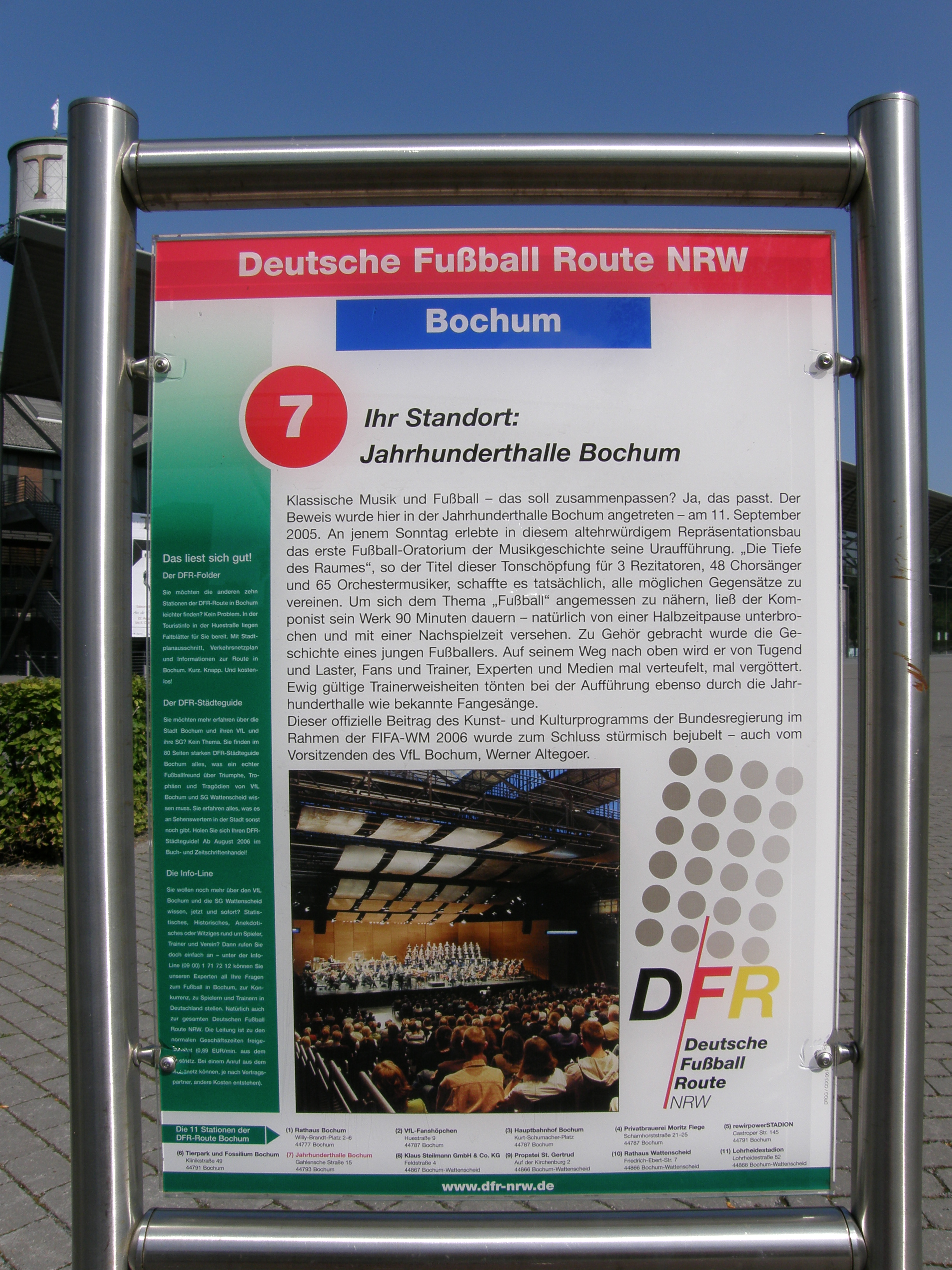 Infoschild an der Jahrhunderthalle in Bochum zur Deutschen Fußballroute (Station 9)